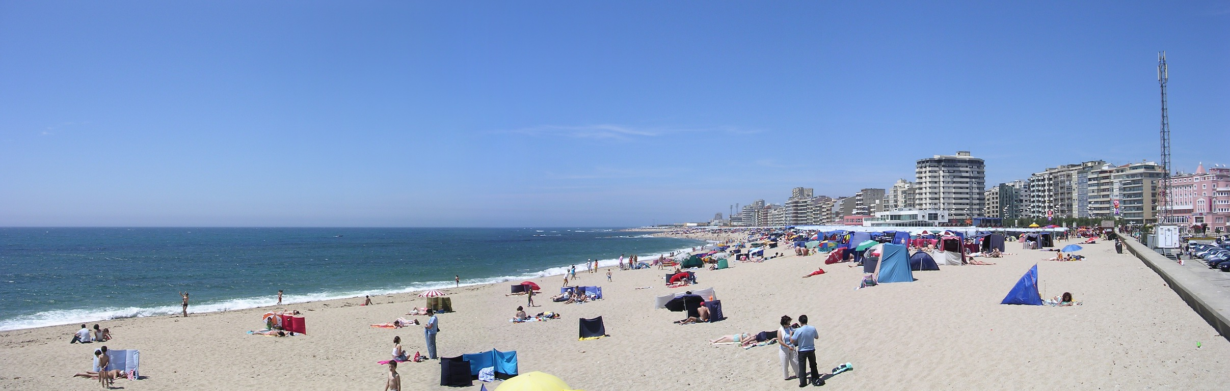 Povoa de Varzim